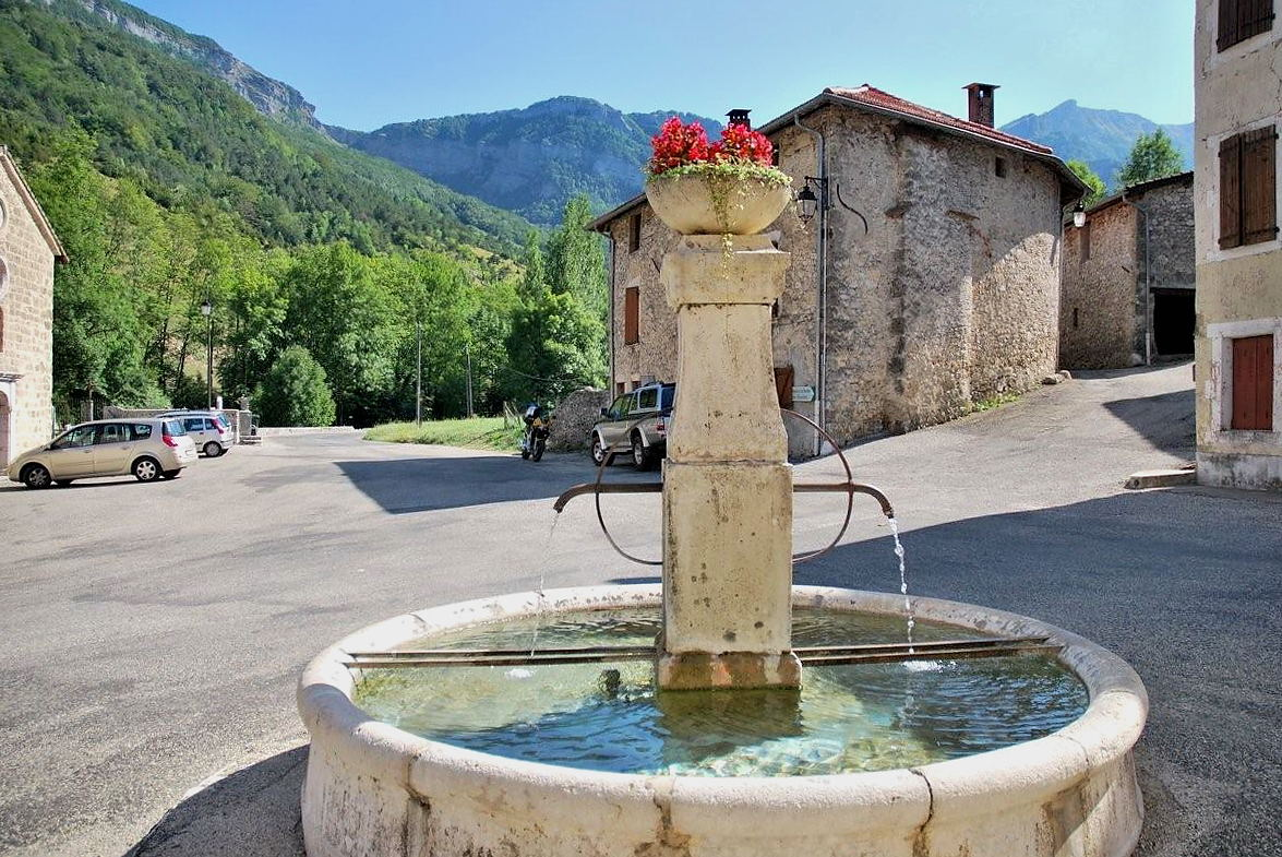 Bouvante le bas